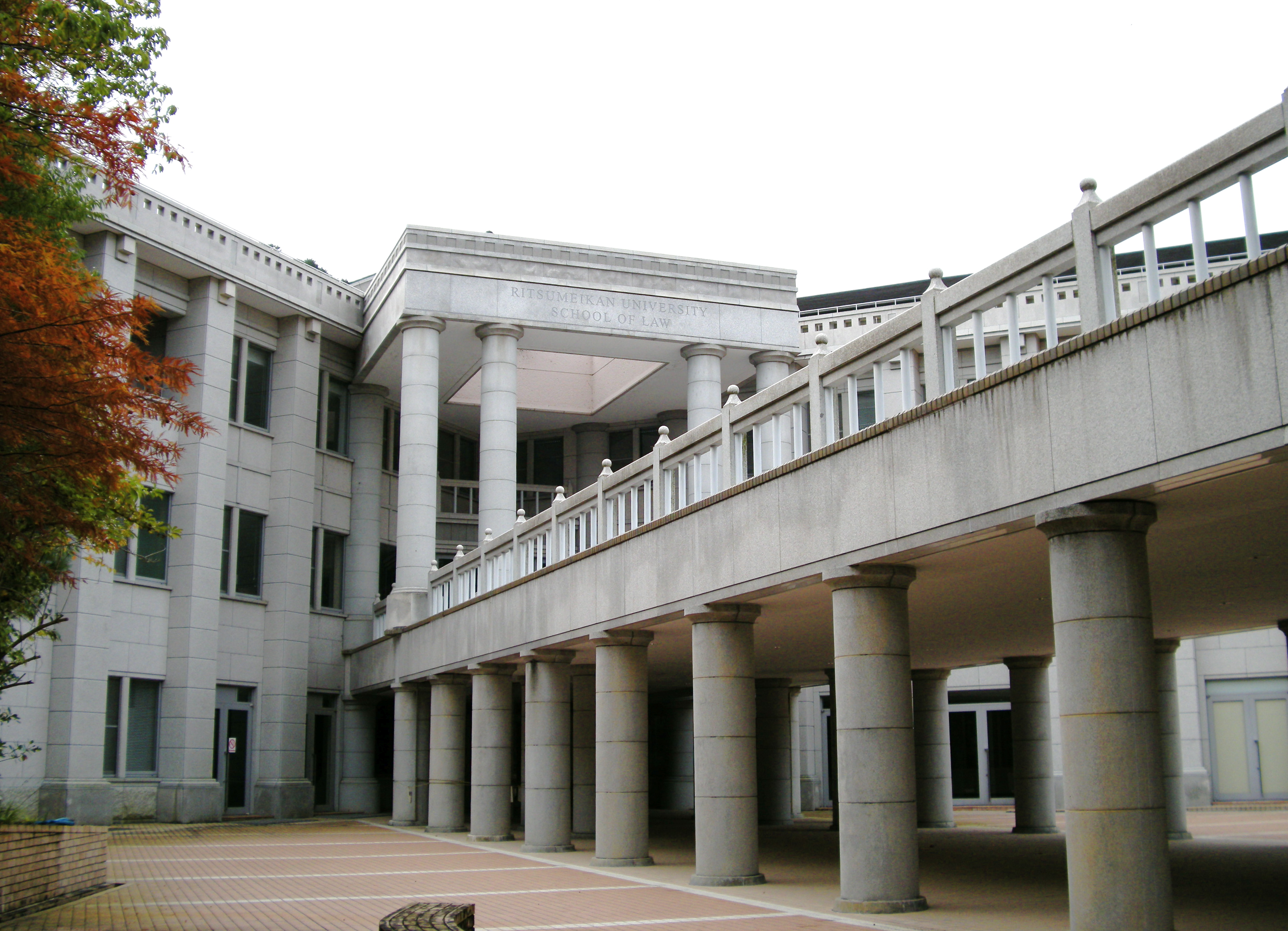 Saionji Memorial Hall (Kinugasa Campus, Ritsumeikan University, Kyoto, Japan)